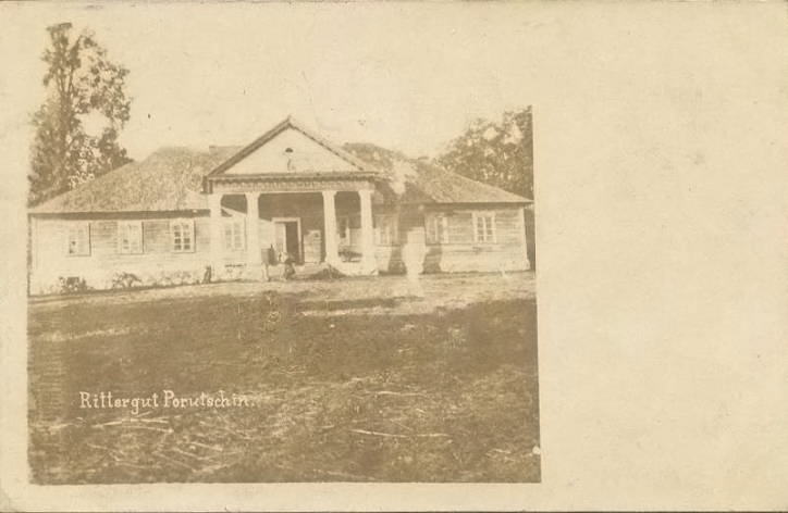 Беларуская (тарашкевіца): Паручын (Paručyn). Сядзіба